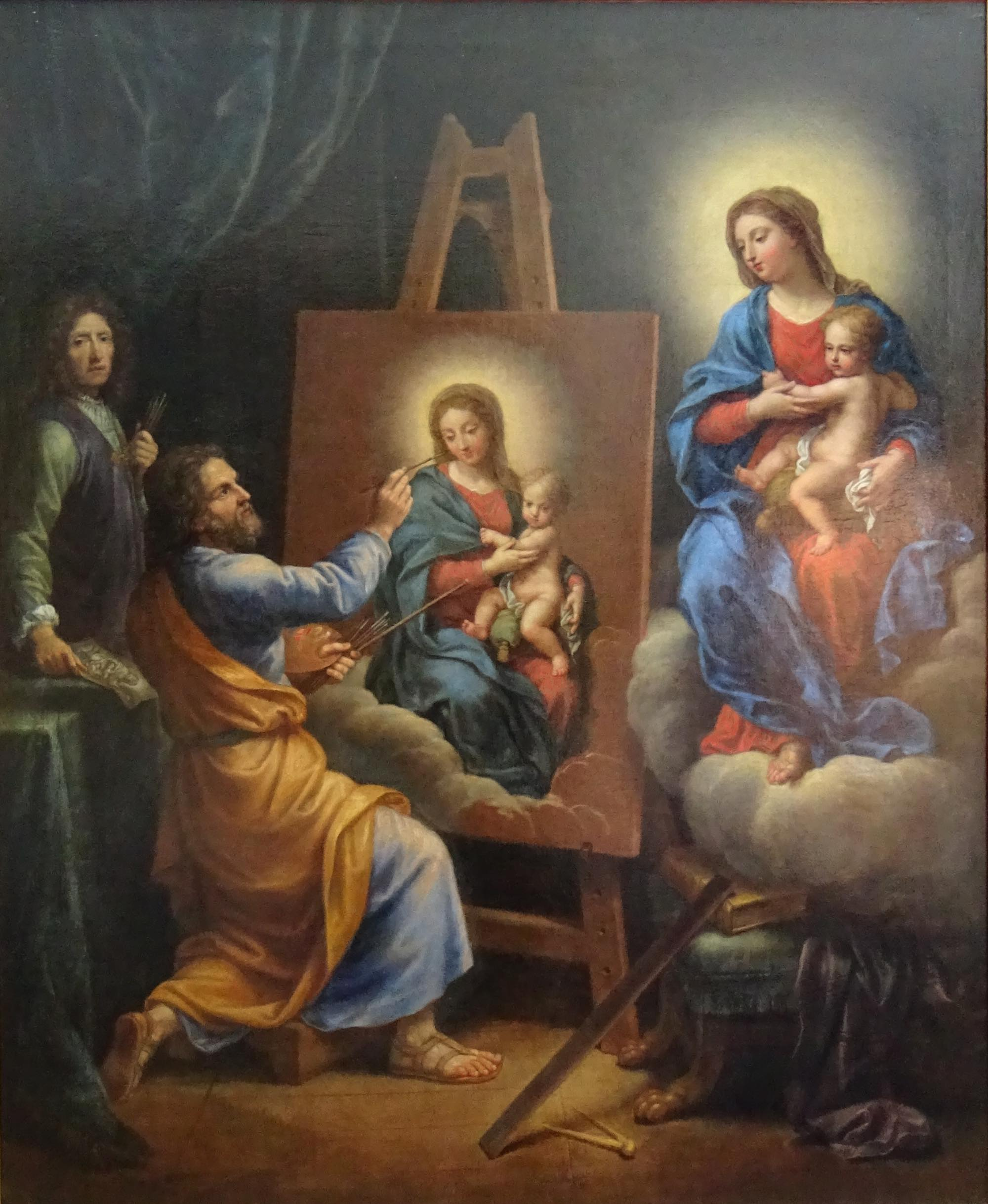 Huile sur toile - 123 x 102,5 cm Troyes, Musée des Beaux-Arts et d’Archéologie Photo : Didier Rykner